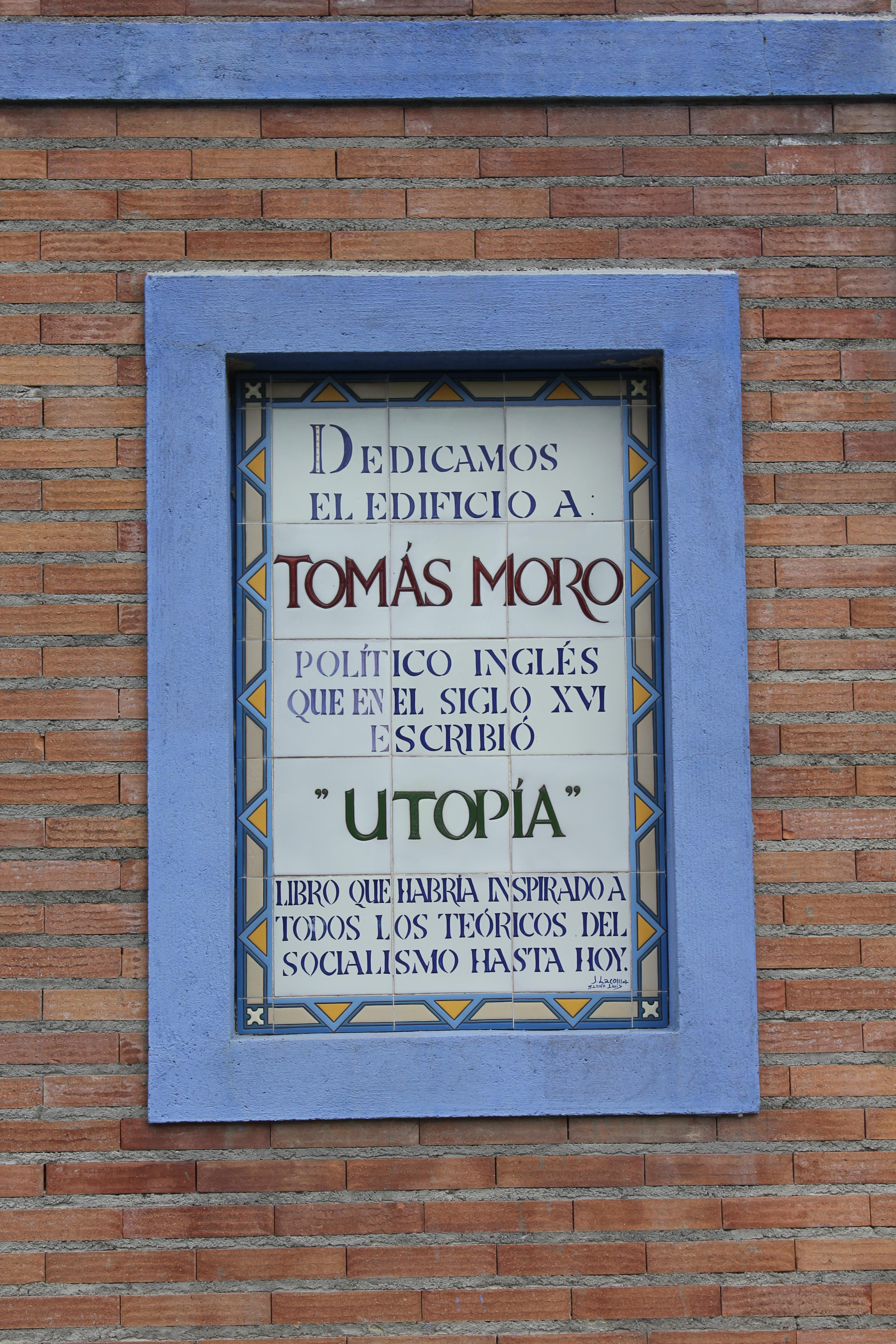 Aragonés: Moriello de Tou